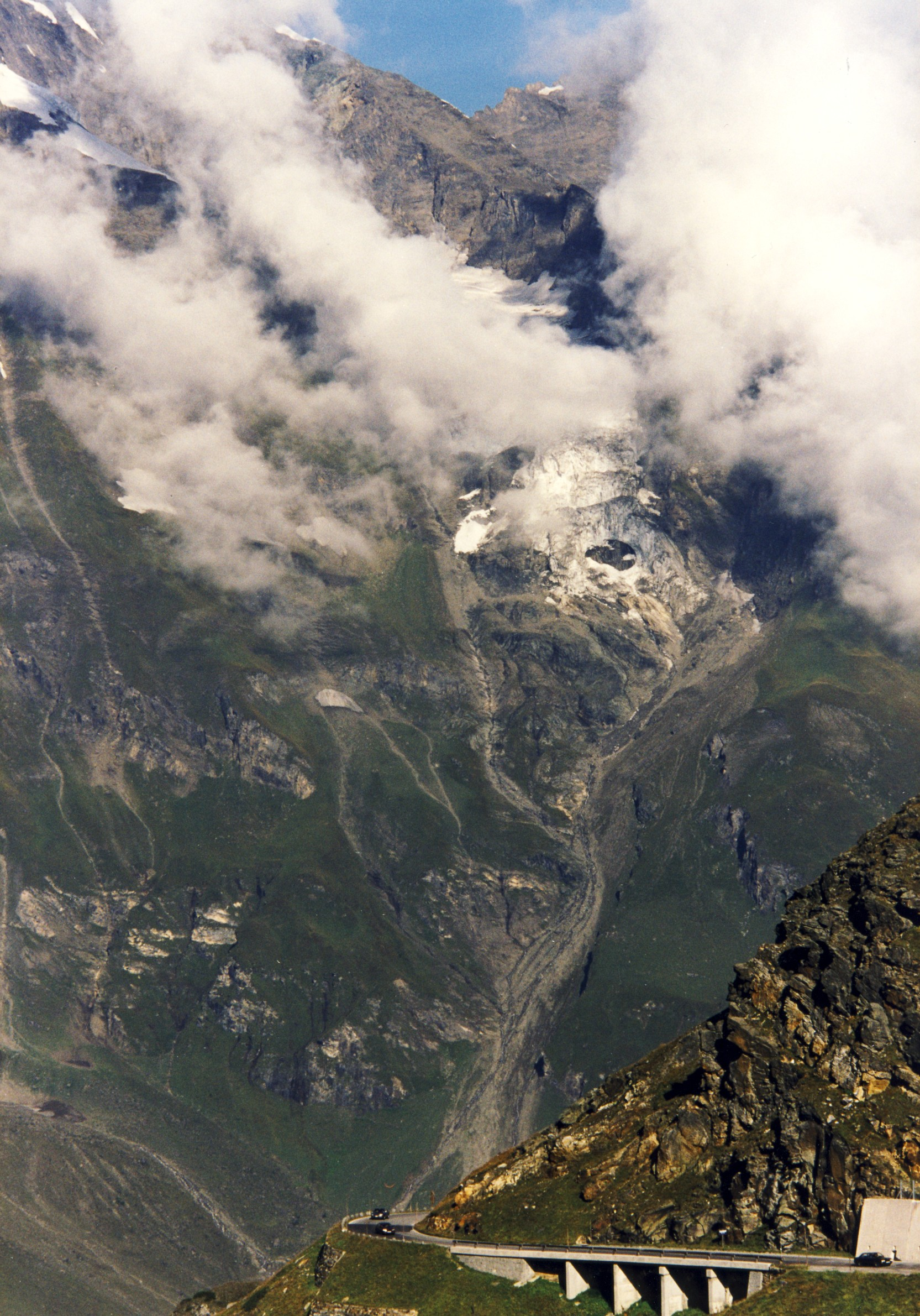 Großglockner-Hochalpenstraße, Österreich